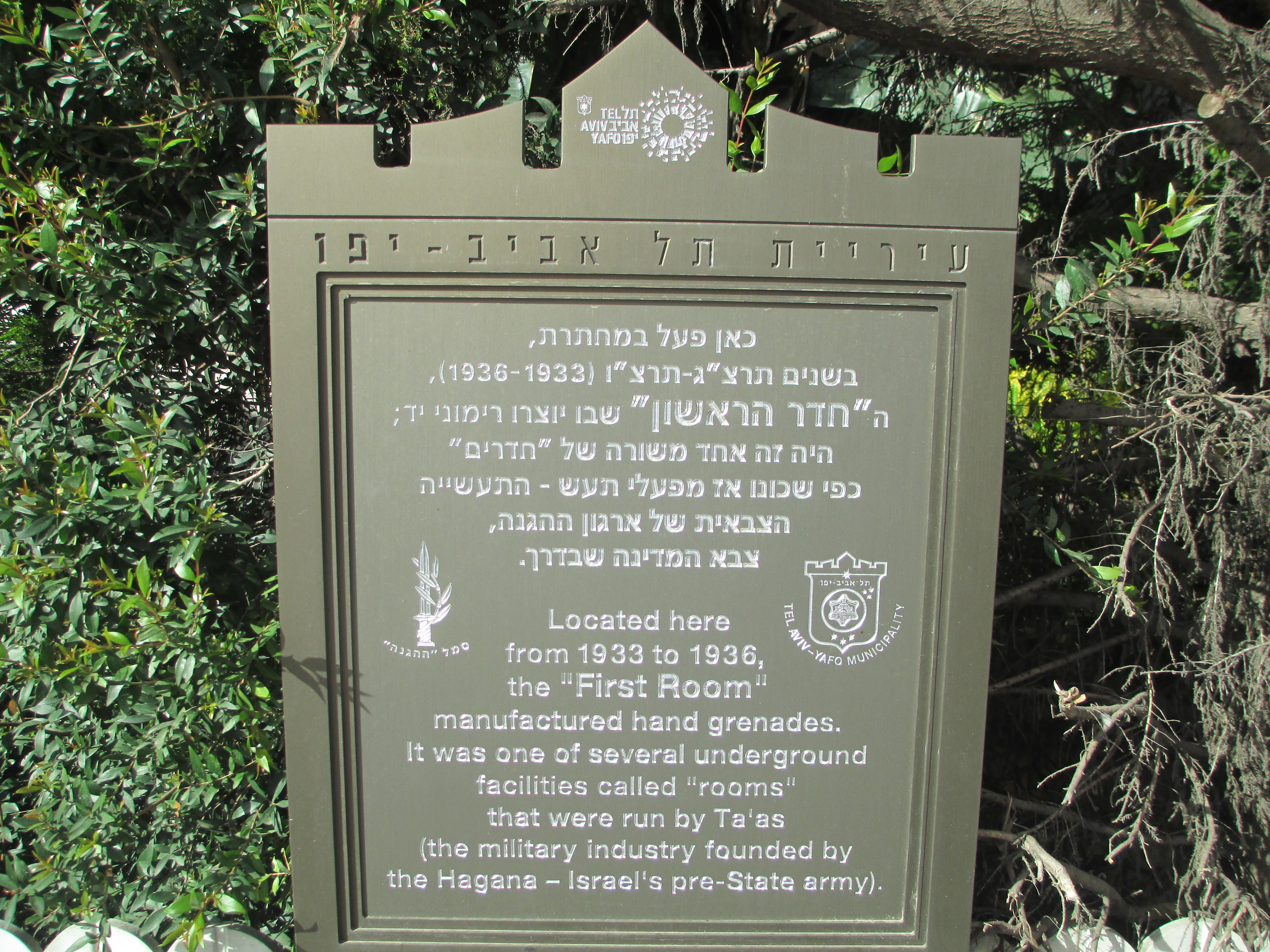 לוחית זיכרון למפעל תע"ש "החדר הראשון" בו מולאו רימוני יד בחומר נפץ, רח' ערבי נחל 22 בתל אביב